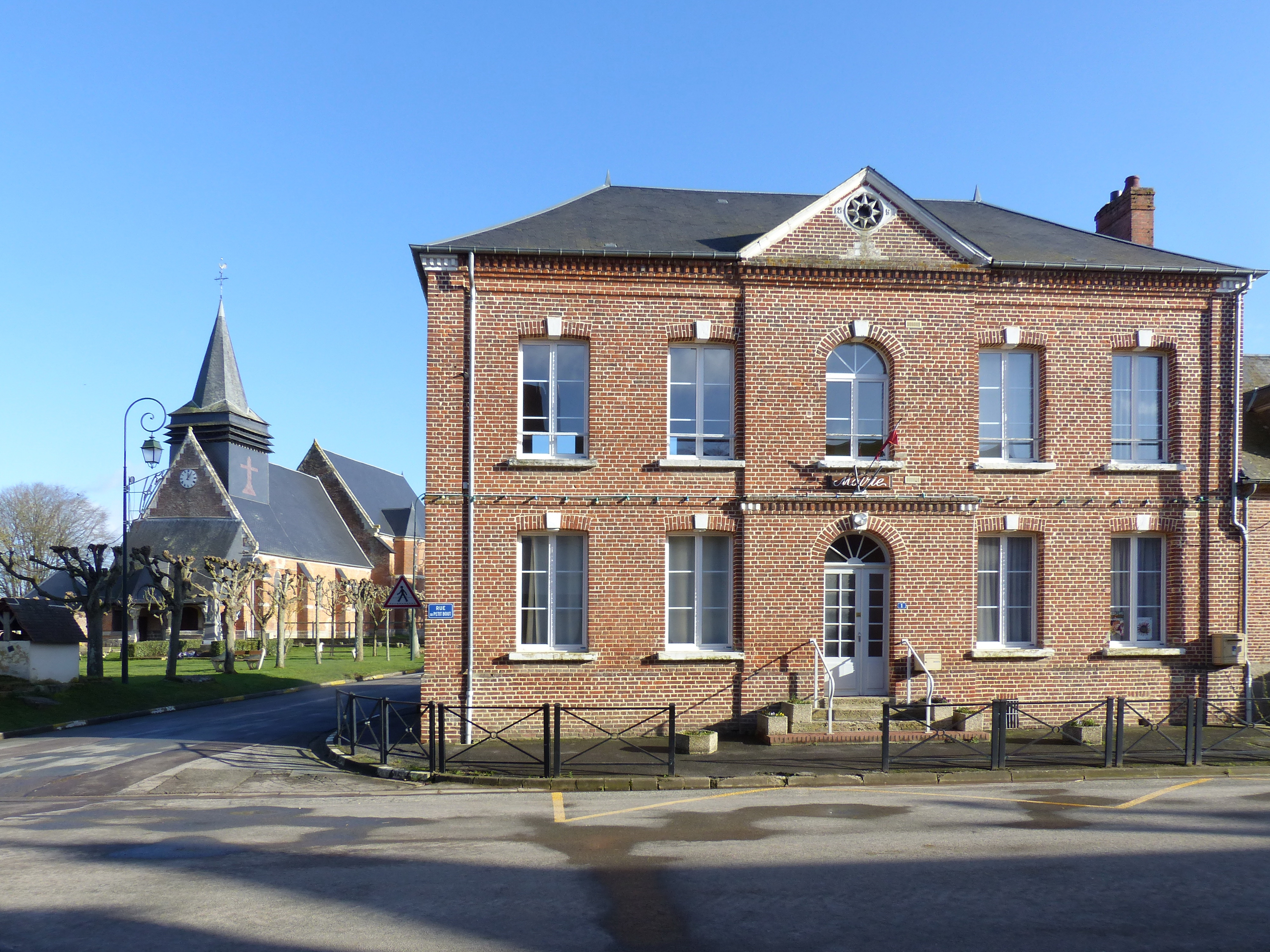 Mairie et église de Haute-Épine